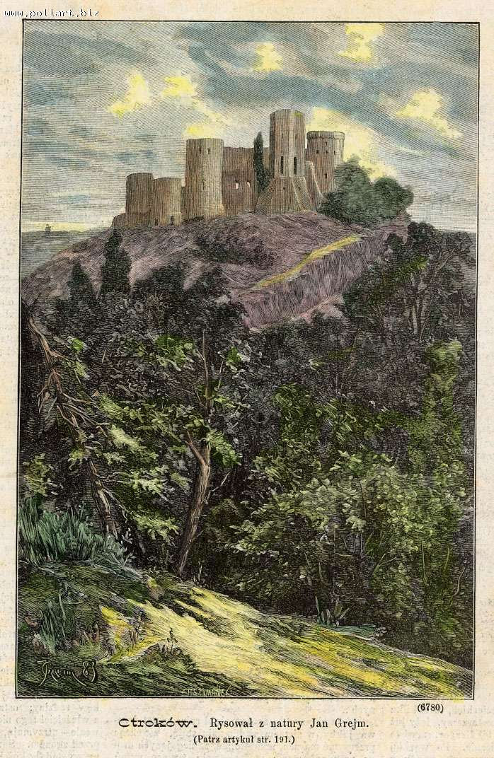 Zamek w Otrokowie na Podolu